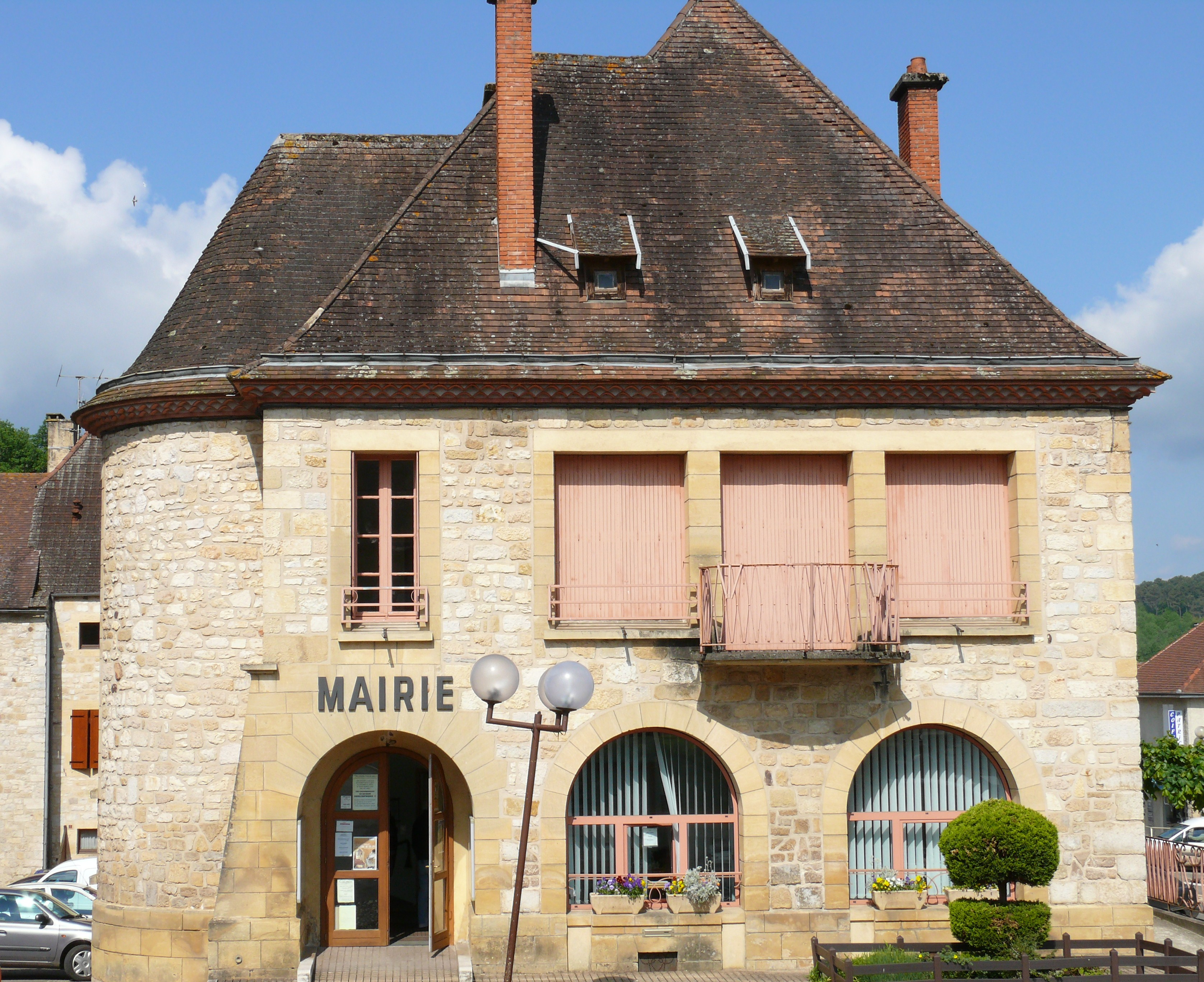 Le Vigan - Mairie